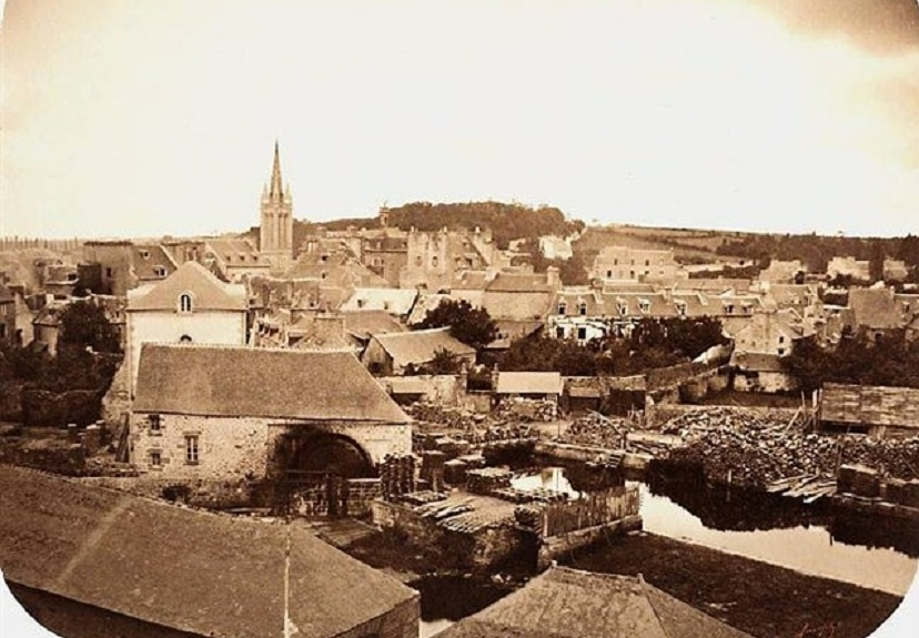 Cette photographie est la plus ancienne connue de Quimper et date de 1860.Au premier plan, l'on distingue la toiture des abattoirs devant le Steir et le moulin de la glacière en face. On voit au second plan le clocher de l'église Saint-Mathieu et à l'arrière-plan la colline de la Terre-Noire qui est encore boisée.